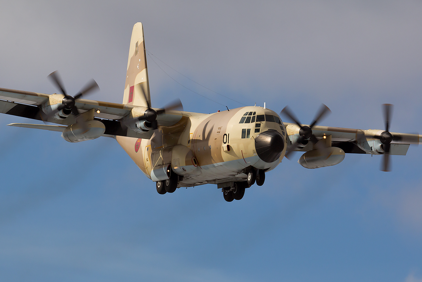 CN-AOI